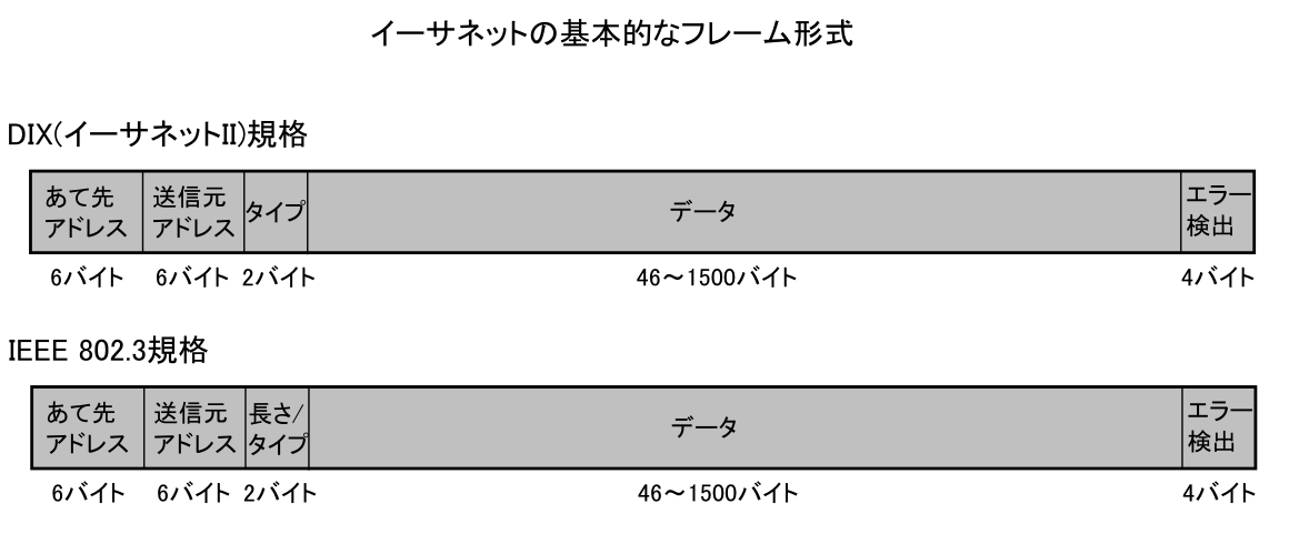 MACフレームの形式 イーサネットの基本的なMACフレームの形式には米デジタル・イクイップメント、米インテル、米ゼロックスが開発した「DIX規格」とIEEE 802.3グループで国際標準化された「IEEE 802.3規格」の2つの形式が存在する。「DIX規格」ではタイプとなっているところが「IEEE 802.3規格」では長さ/タイプとなっているだけが違う。「DIX規格」のほうが広く使用されている。「IEEE 802.3規格」でも「DIX規格」と同じようにタイプを指定できる。.